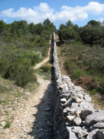 Mur de la peste